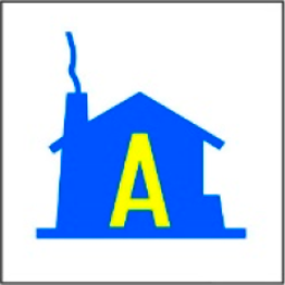 pictograma albergue